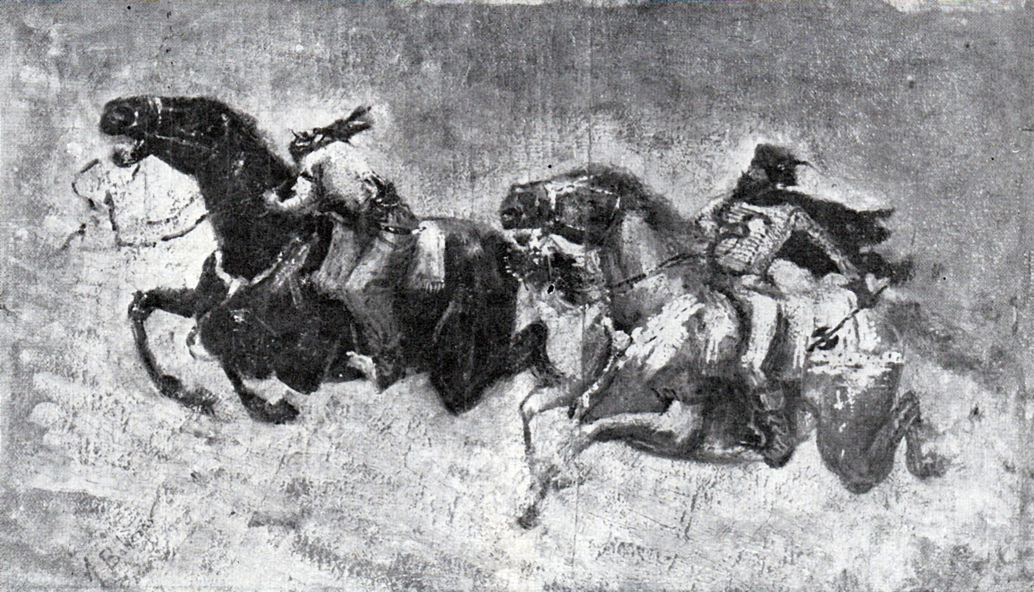 Mihai Viteazul alungând pe Sinan Pașa. Semnat stânga jos A. Baltazar, nedatat. Bibliografie: P. Oprea, Colecționari de artă bucureșteni, 1976, pag. 78.